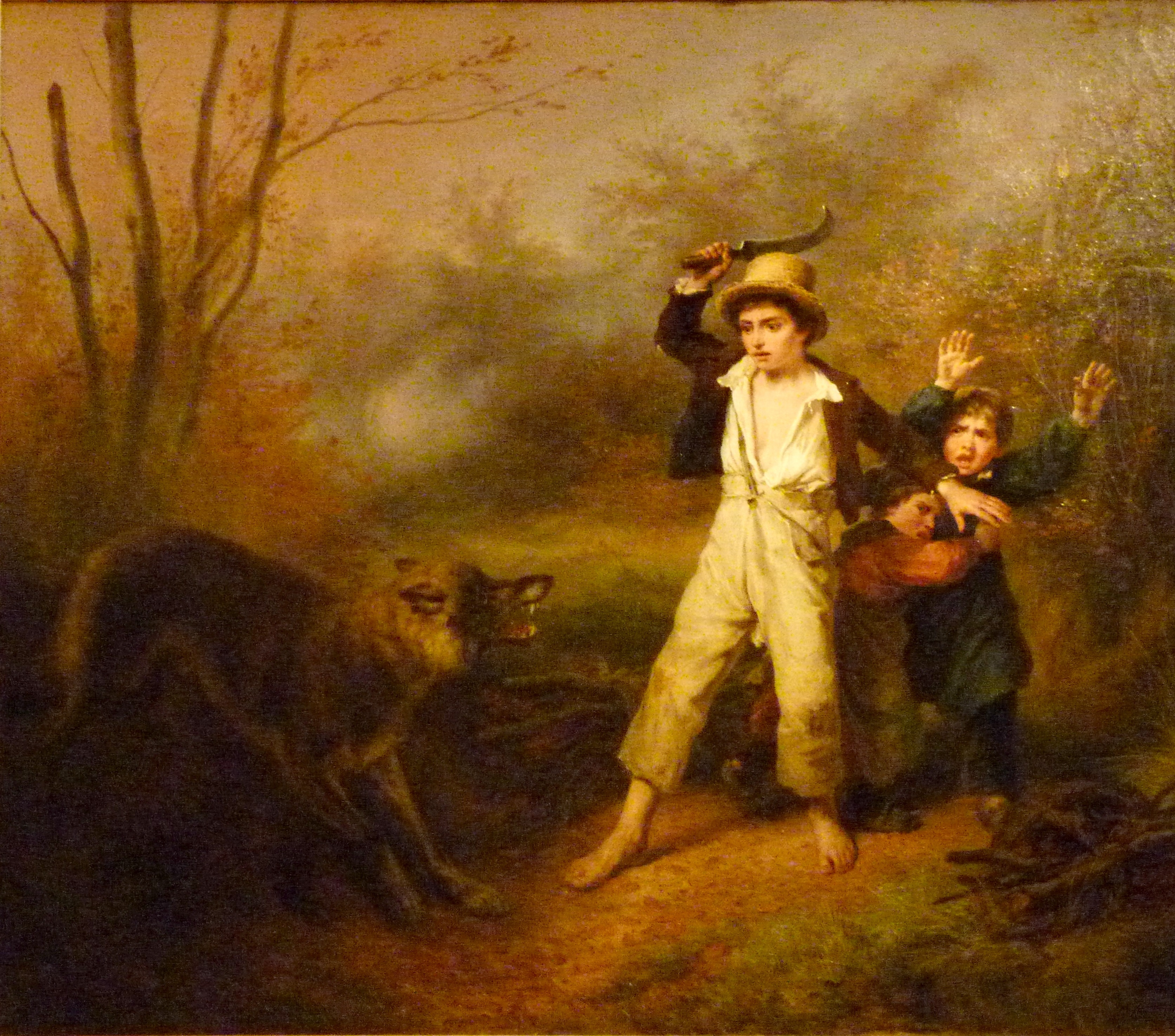 Petits paysans surpris par un loup (1833), huile sur toile, environ 1,50 m x 1,70 m, François Grenier de Saint-Martin (1793-1867) - Musée de la Chasse et de la Nature, Paris - Dépôt du Musée des Beaux-Arts de Nantes.